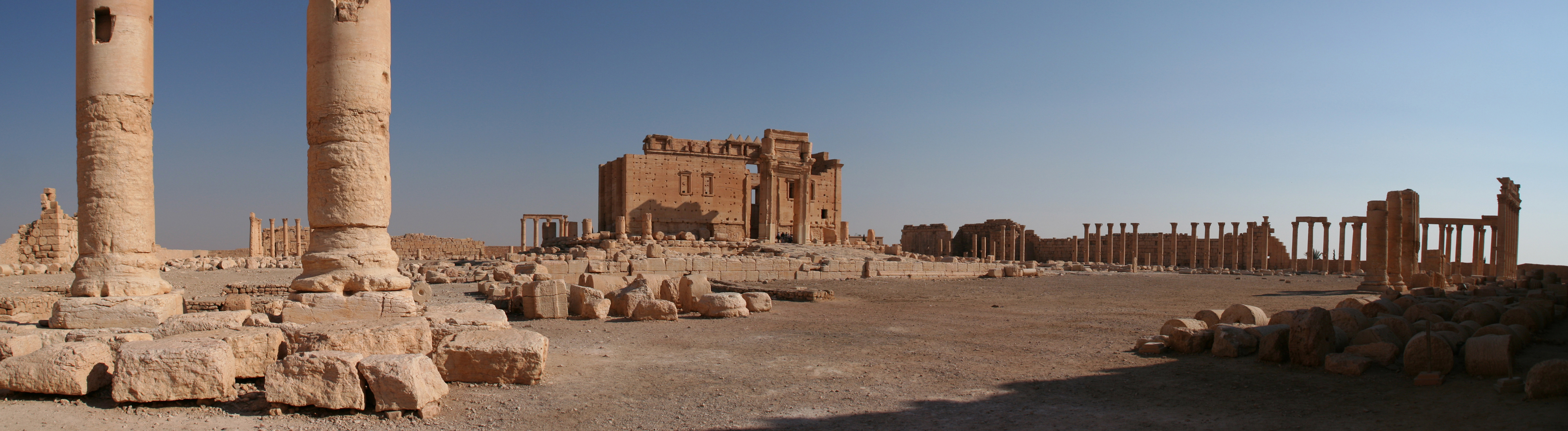 Vista panorámica de las ruinas de Palmira y del Templo de Bel, Siria.